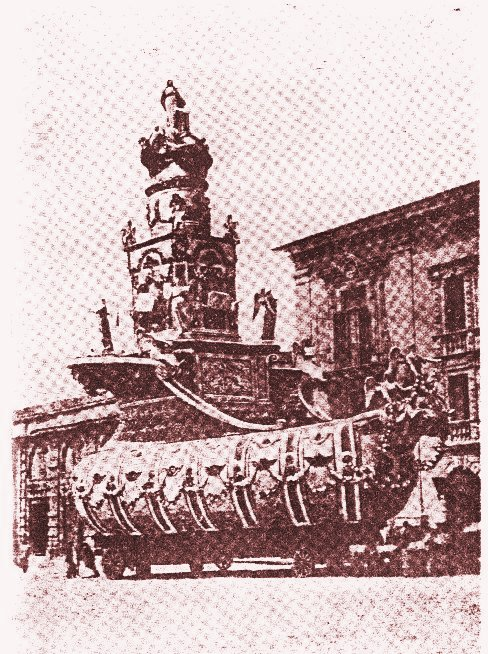 Barca di Sant'Agata (1874). La foto venne stampata invertita.